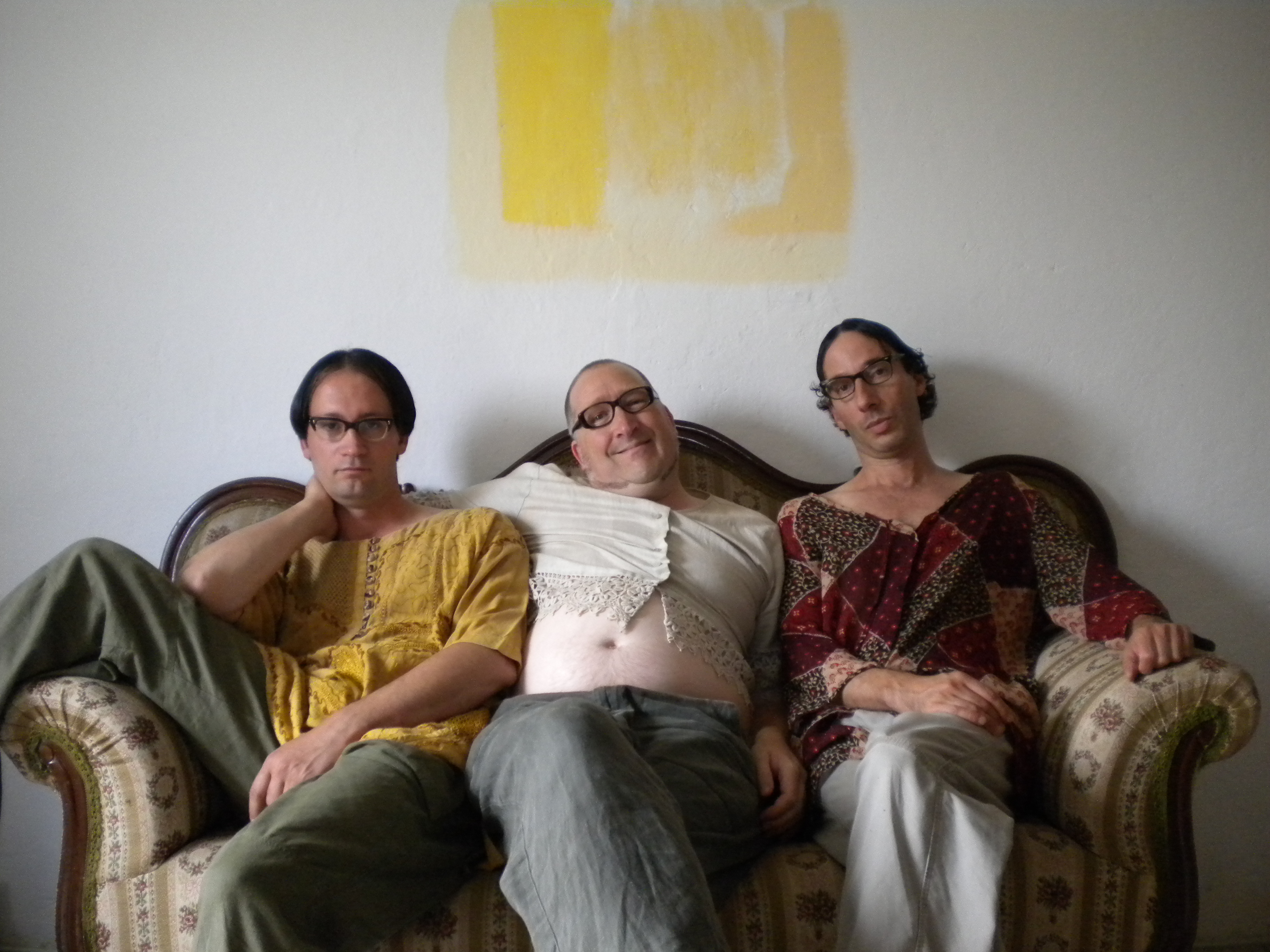 Herbert, Horst und Heinz auf dem heimischen Sofa